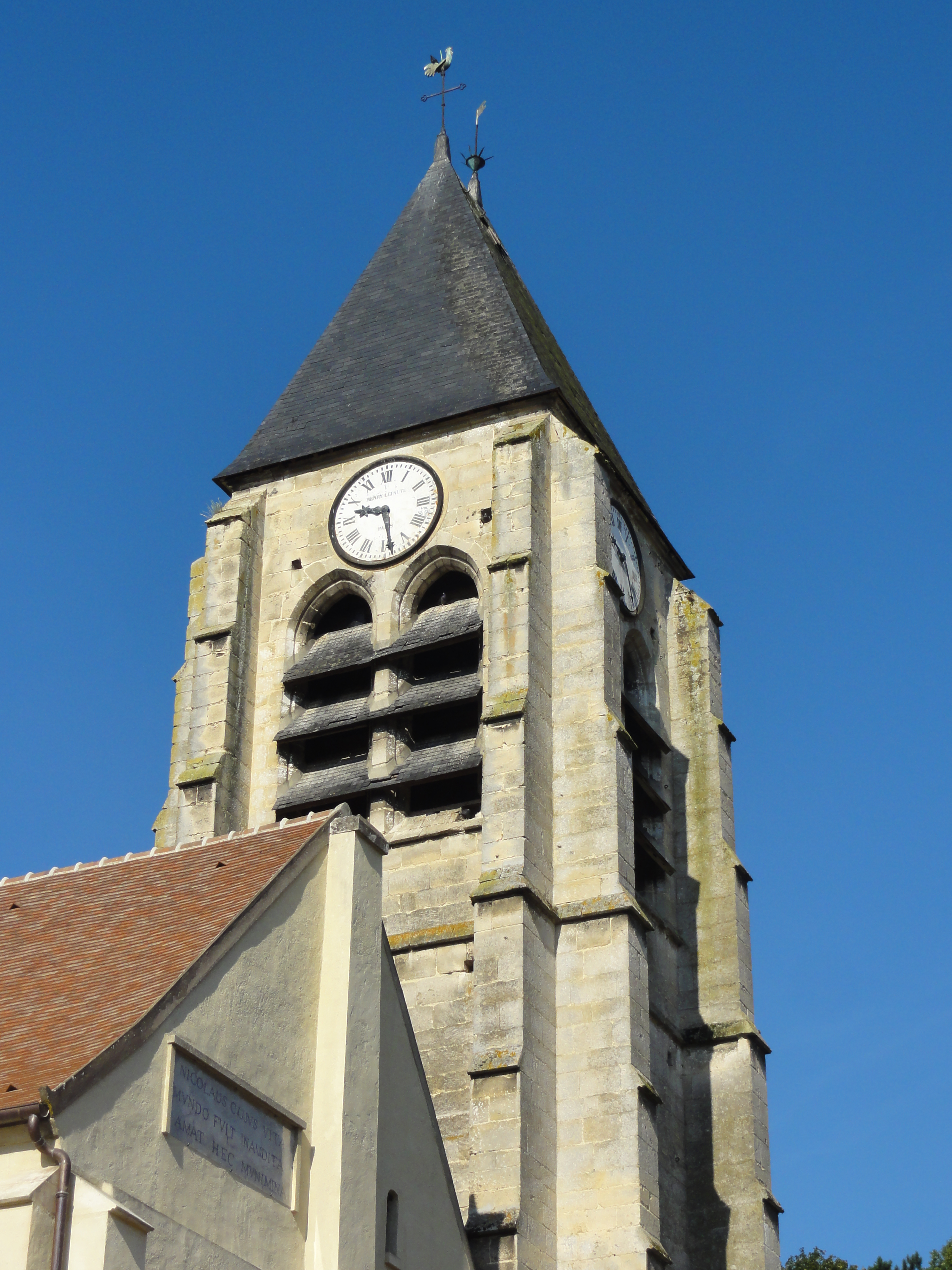 Clocher, étage de beffroi.